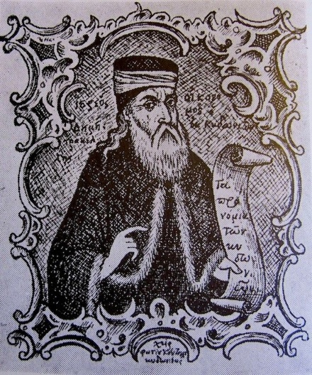 Δια χειρός Φώτη Κόντογλου, του Αιβαλιώτη λογοτέχνη κι αγιογράφου